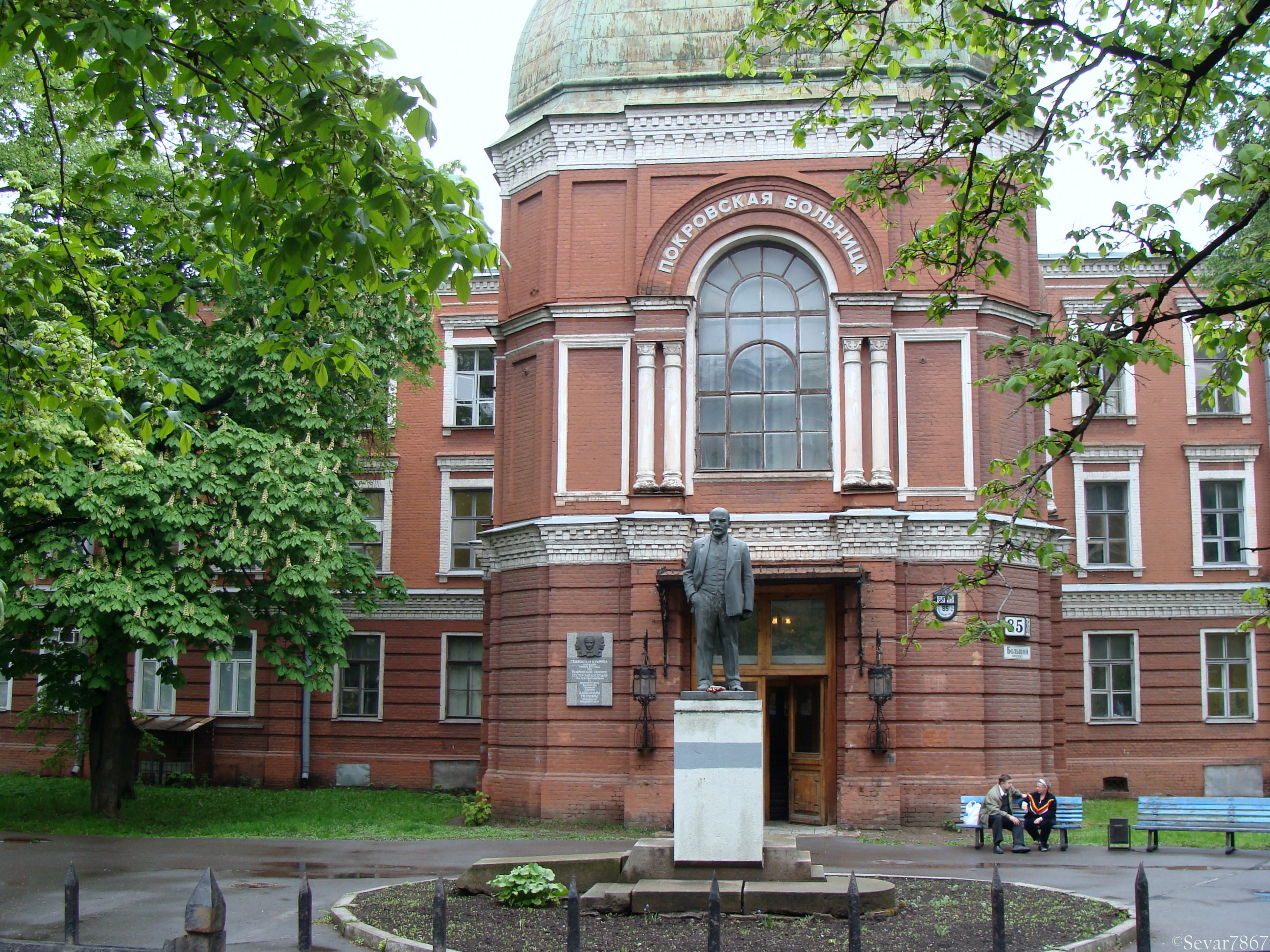 Monument to V. Lenin in Pokrovskaya Hospital